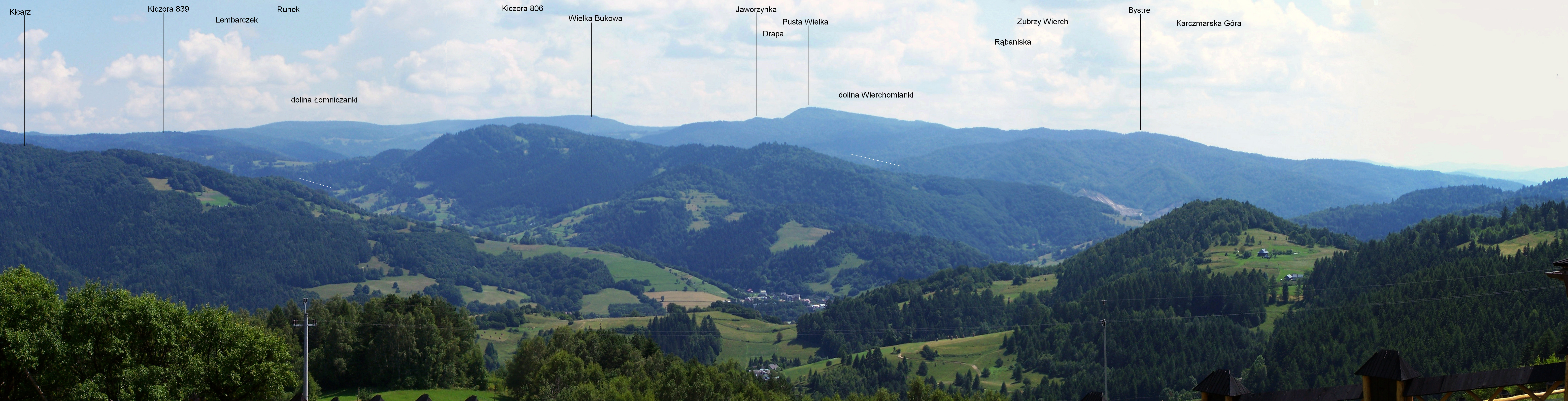 Widok z Zaczerczyka na wschodnią część Pasma Jaworzyny (panorama)